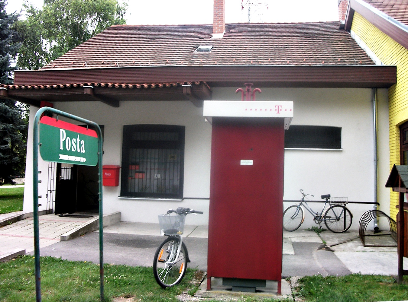 A Magyar Posta épülete Héderváron.